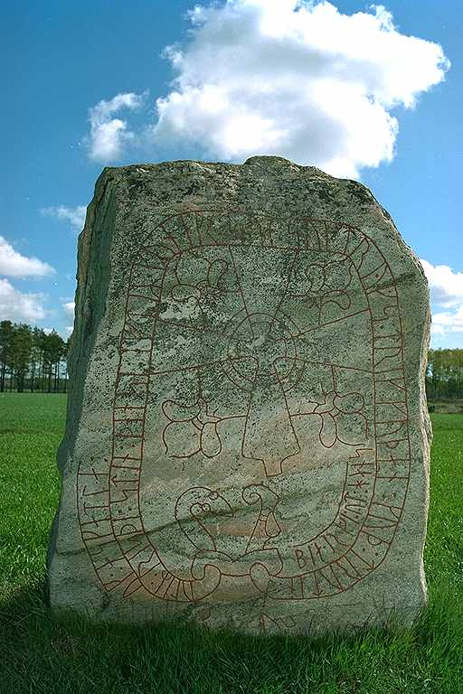 Inskriften lyder: Ölver (?) och Åskatla reste denna sten efter Gunnar, Sigtryggs son, en god ung man. Herren Gud bärge hans ande. Motiv: Vg127 Larvs Hed Nyckelord: Runor Kategori: Runristning/runsten Inskriften lyder: Ölver (?) och Åskatla reste denna sten efter Gunnar, Sigtryggs son, en god ung man. Herren Gud bärge hans ande.